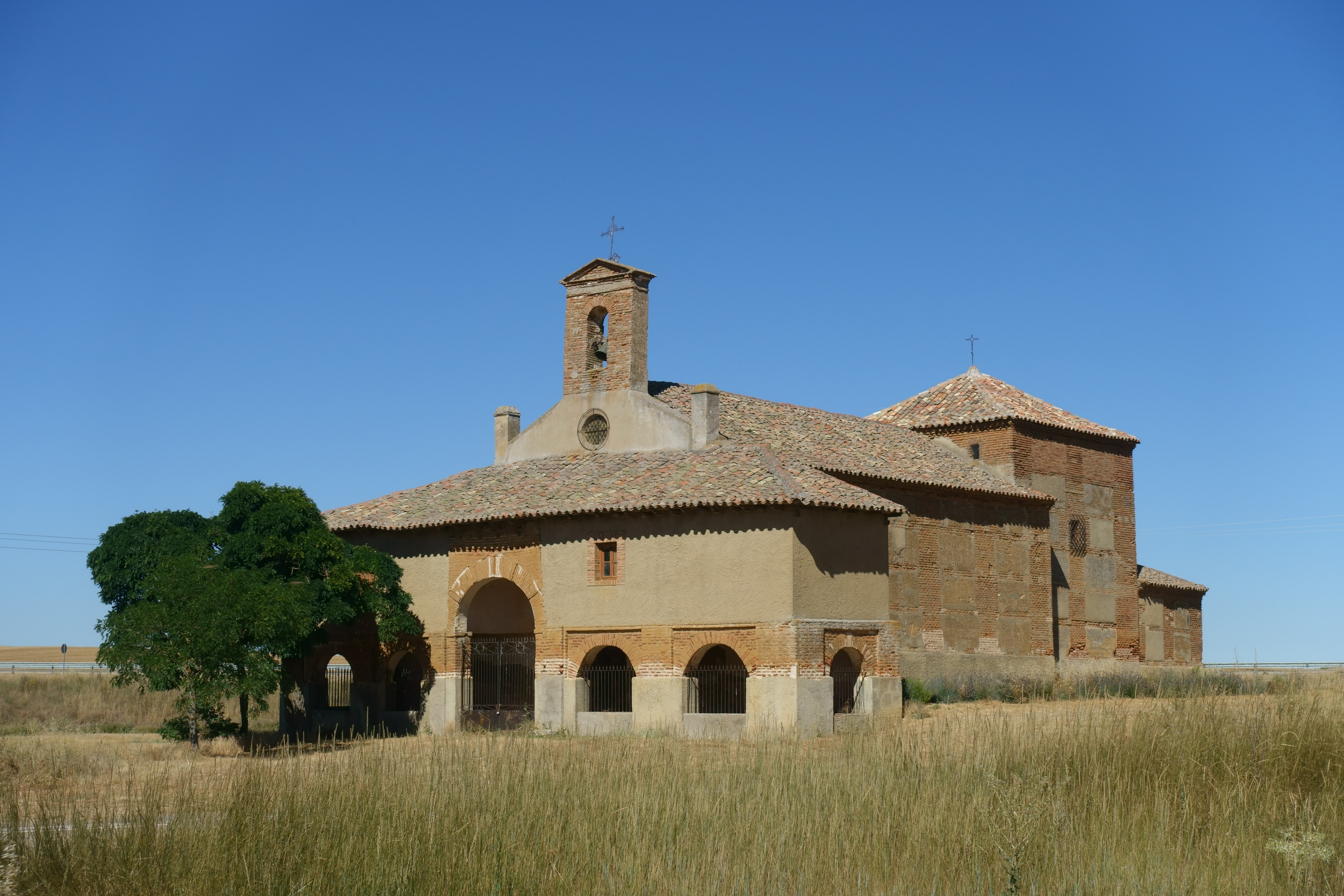 Ermita de la Virgen del Río, a las afueras de Villada (Palencia, España).